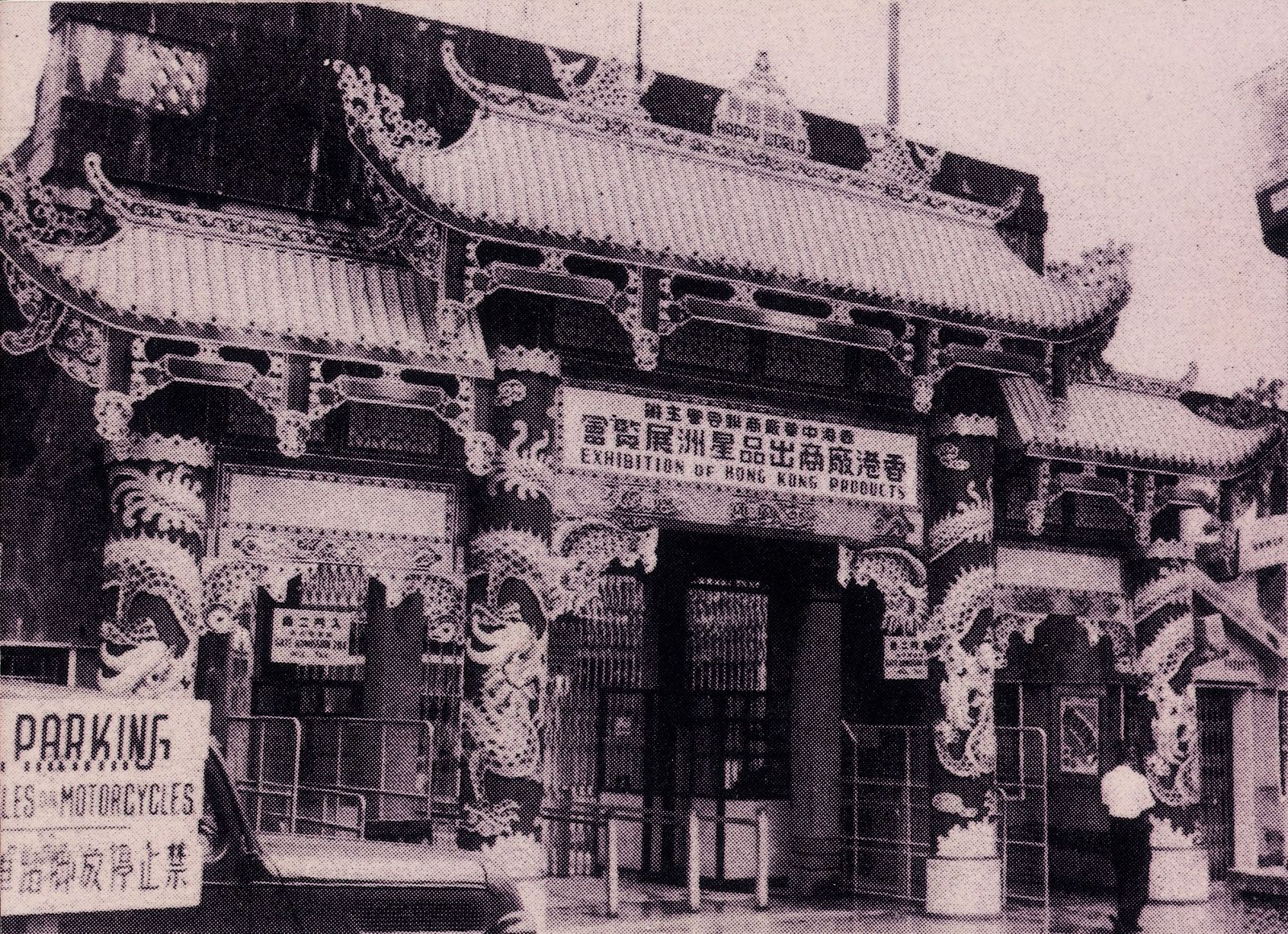 粵語: 參加喺星加坡舉行嘅「第一屆中國國貨展覽會」，乃香港中華廠商聯合會首次參與海外工業產品展覽。